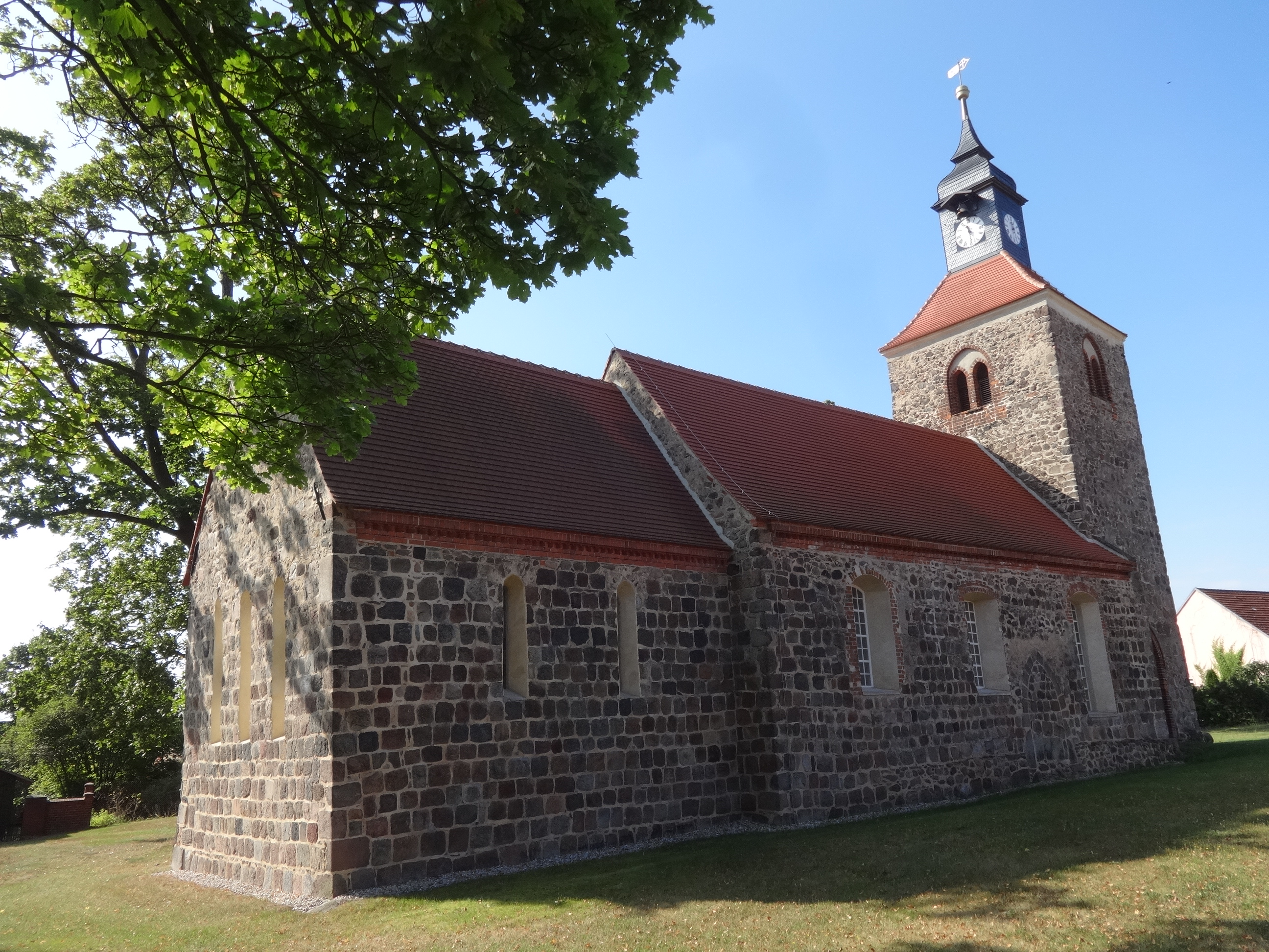 Die Feldsteinkirche wurde in der zweiten Hälfte des 13. Jahrhunderts erbaut. Im 15. Jahrhundert kam der Westturm hinzu, der 1753 einen Aufsatz erhielt. In seinem Innern befinden sich unter anderem ein Altar aus dem Anfang des 18. Jahrhunderts sowie eine Fünte aus dem 19. Jahrhundert.